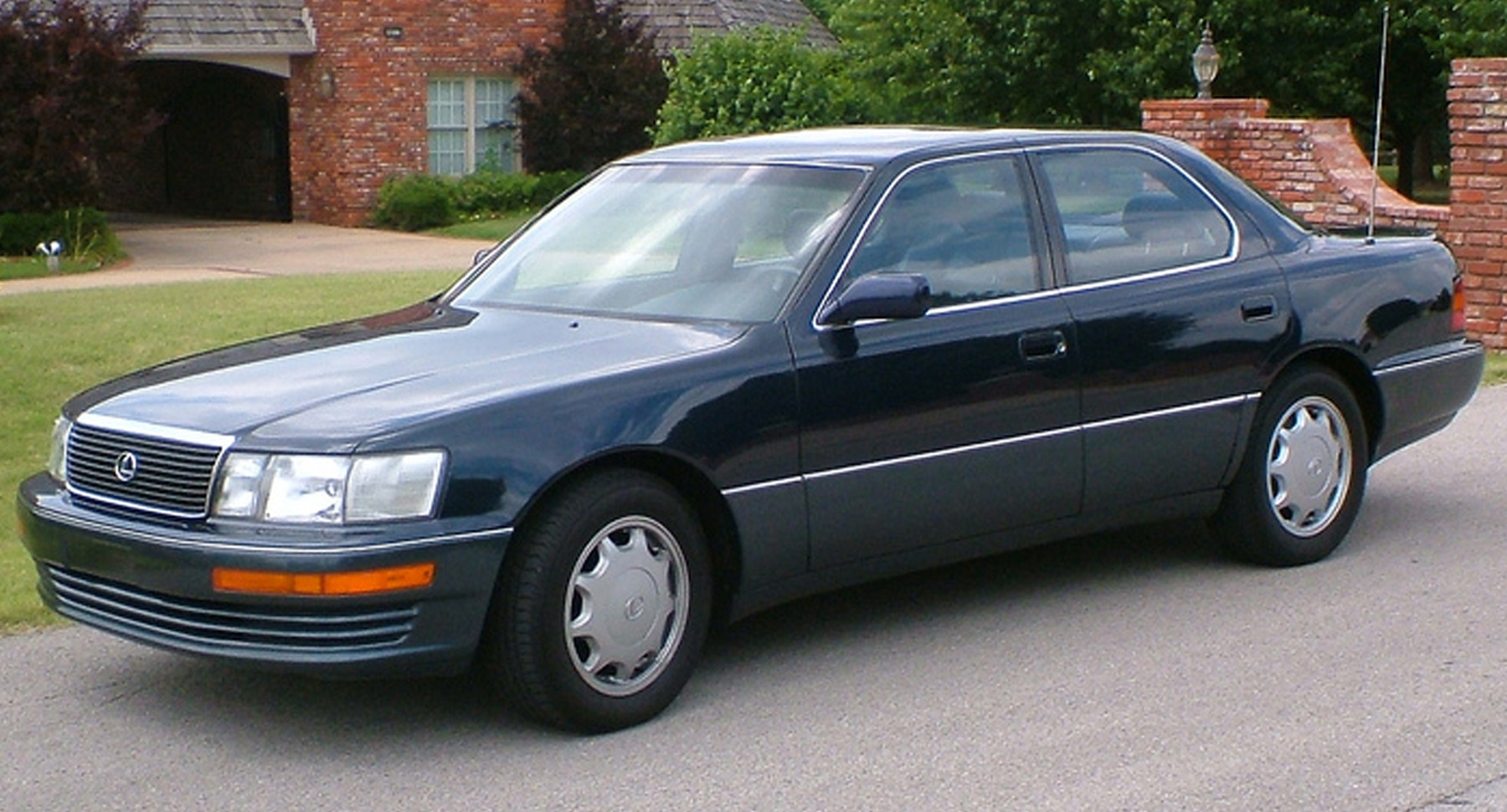 Lexus LS 400 UCF10 II